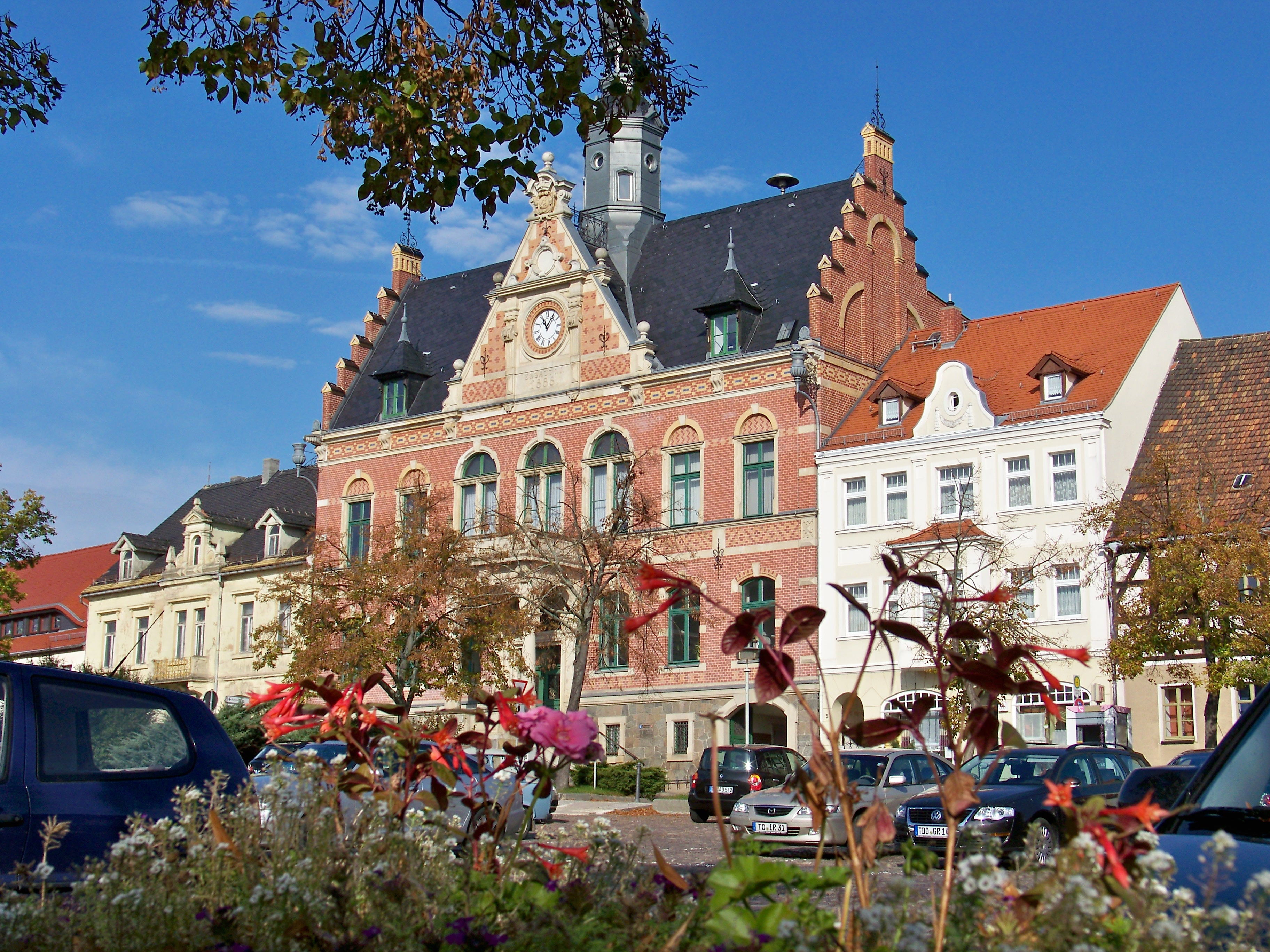 Marktplatz in Dahlen/Sachsen mit dem Rathaus (* 1888)